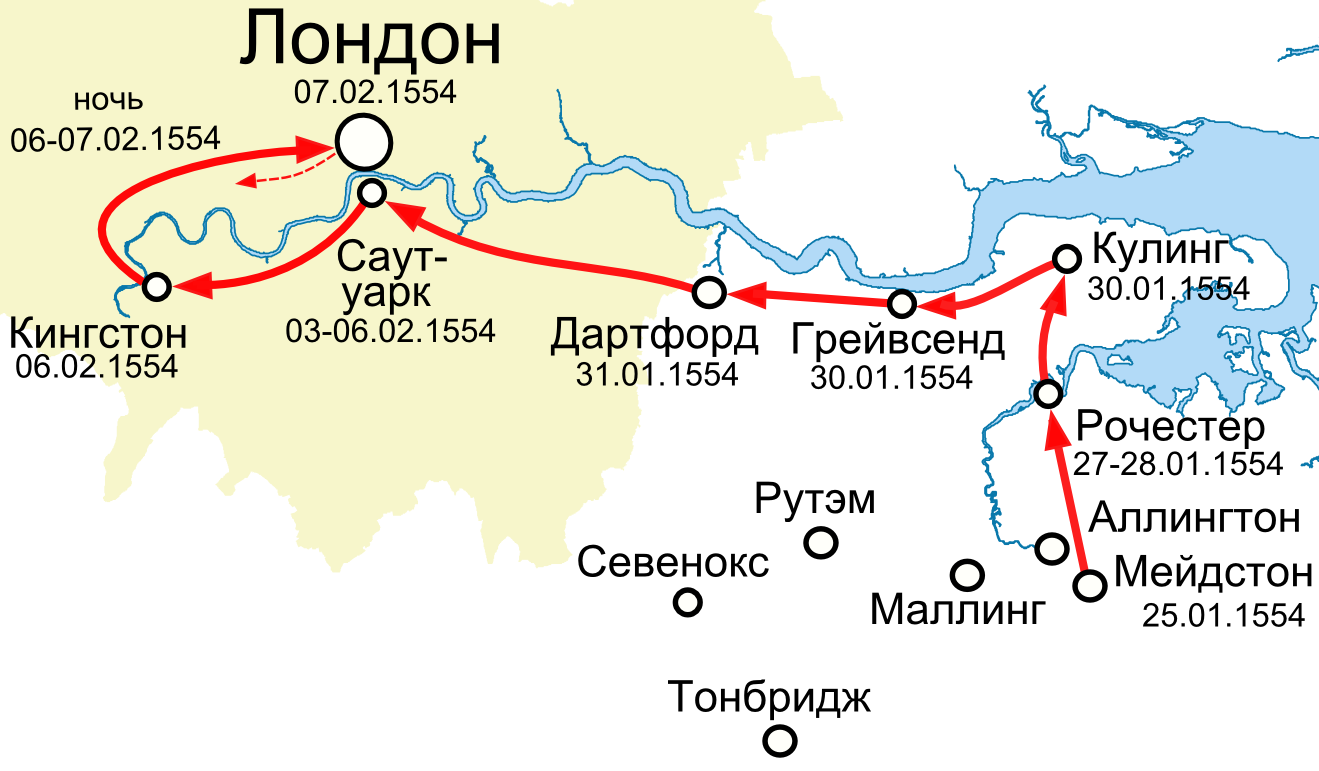 Восстание Уайетта. Передвижения основного отряда мятежников. Цветом выделены современные границы Большого Лондона.